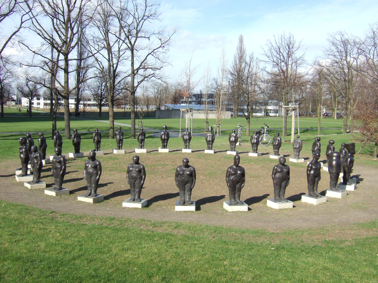 Tina Schwichtenberg: Frauen De Formation – Bonn - Post Tower Material: Bronze